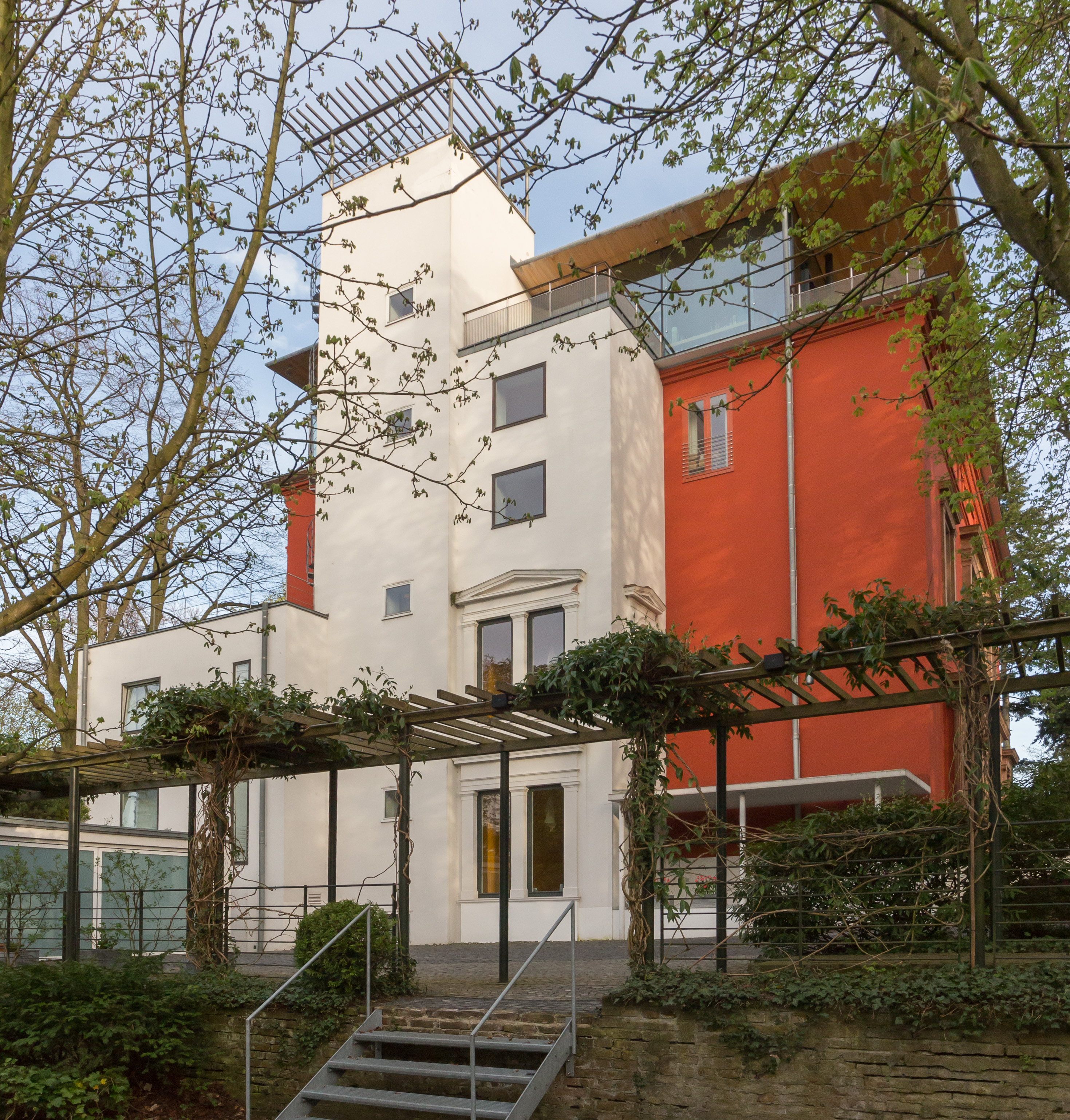 Villa Prieger, Raiffeisenstraße 2–4, Bonn: Ansicht aus Nord-Ost